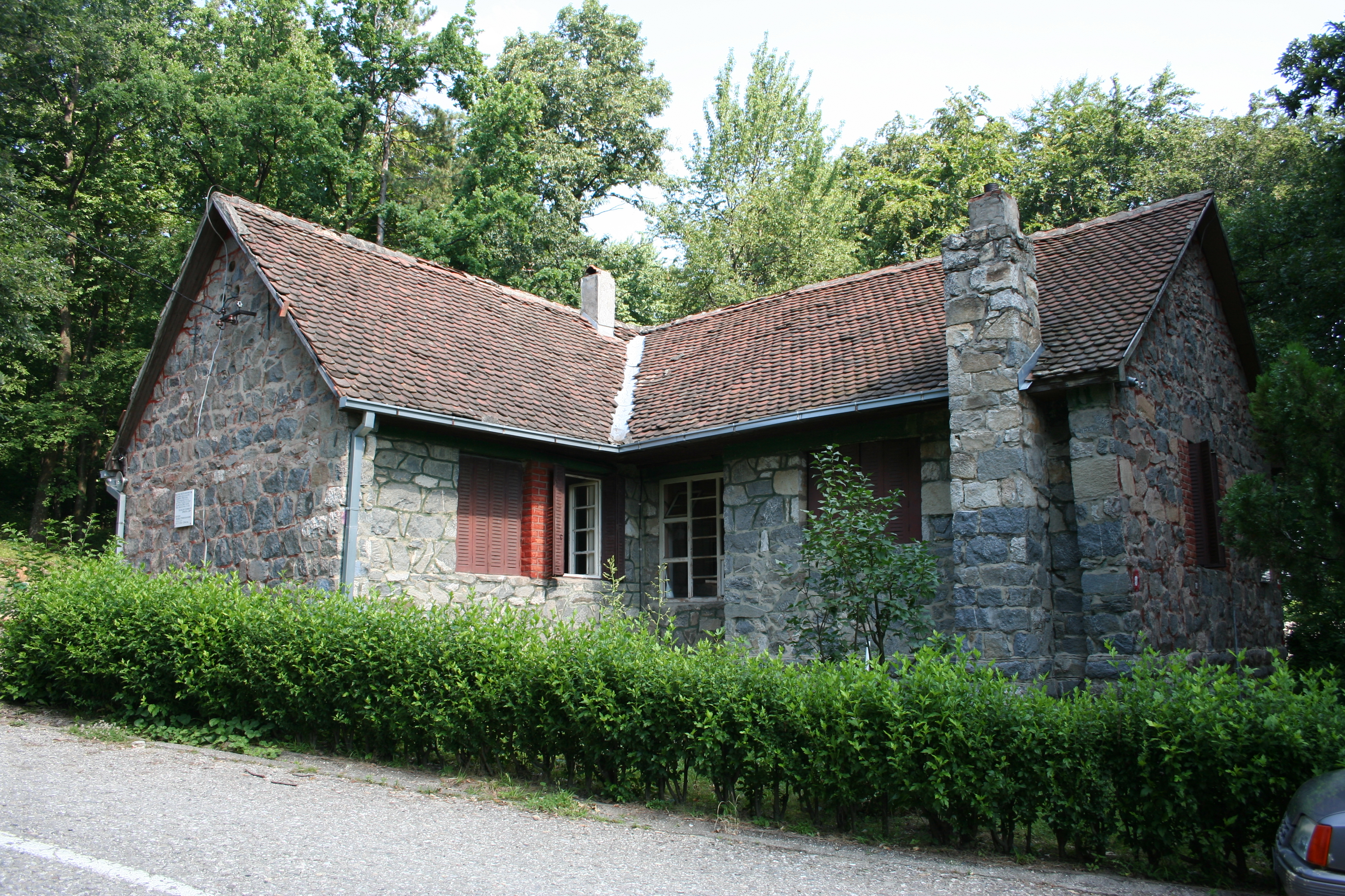 Planinarski dom na Ceru